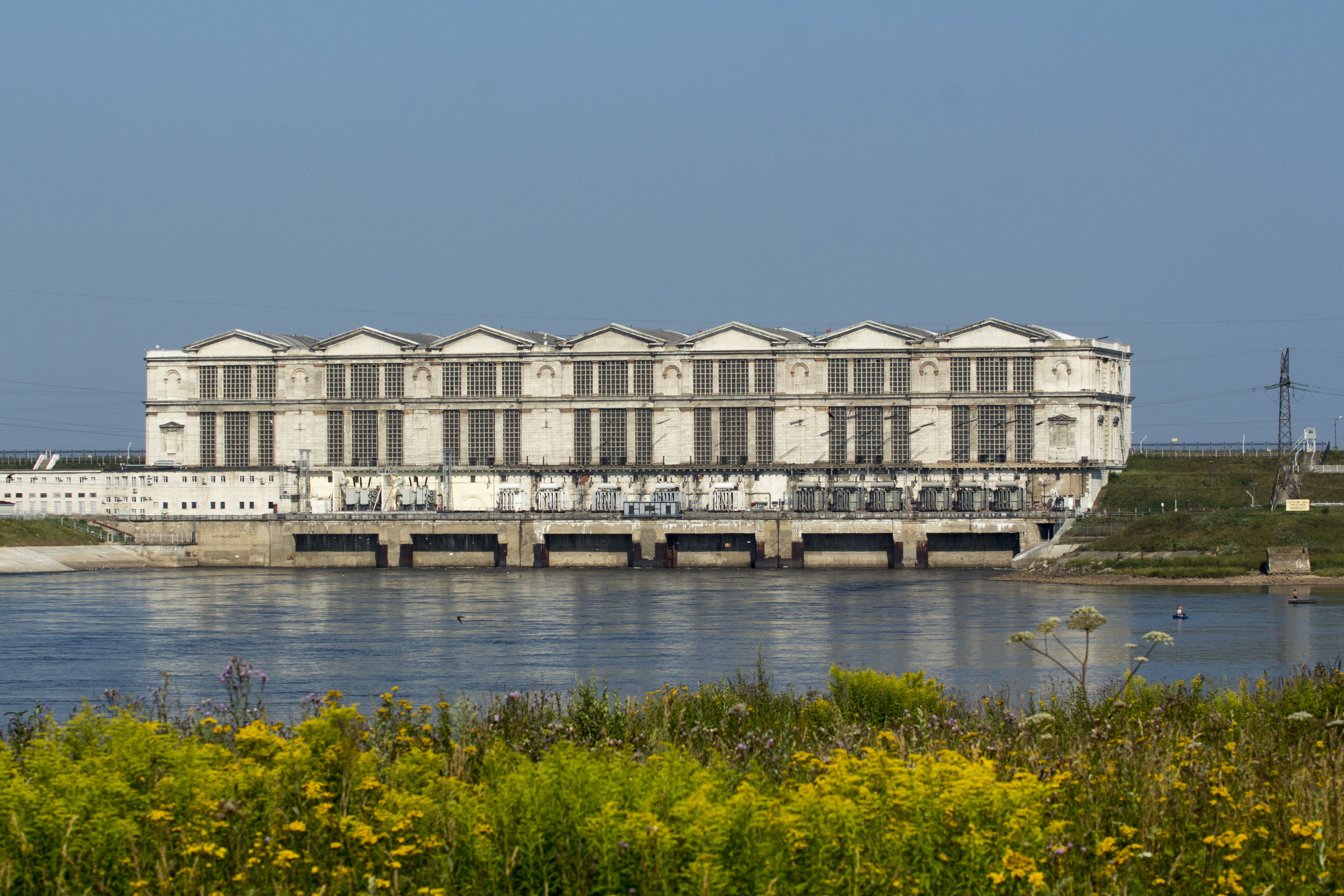 Рыбинская гидроэлектростанция (Ярославская область, Рыбинск, р. волга)